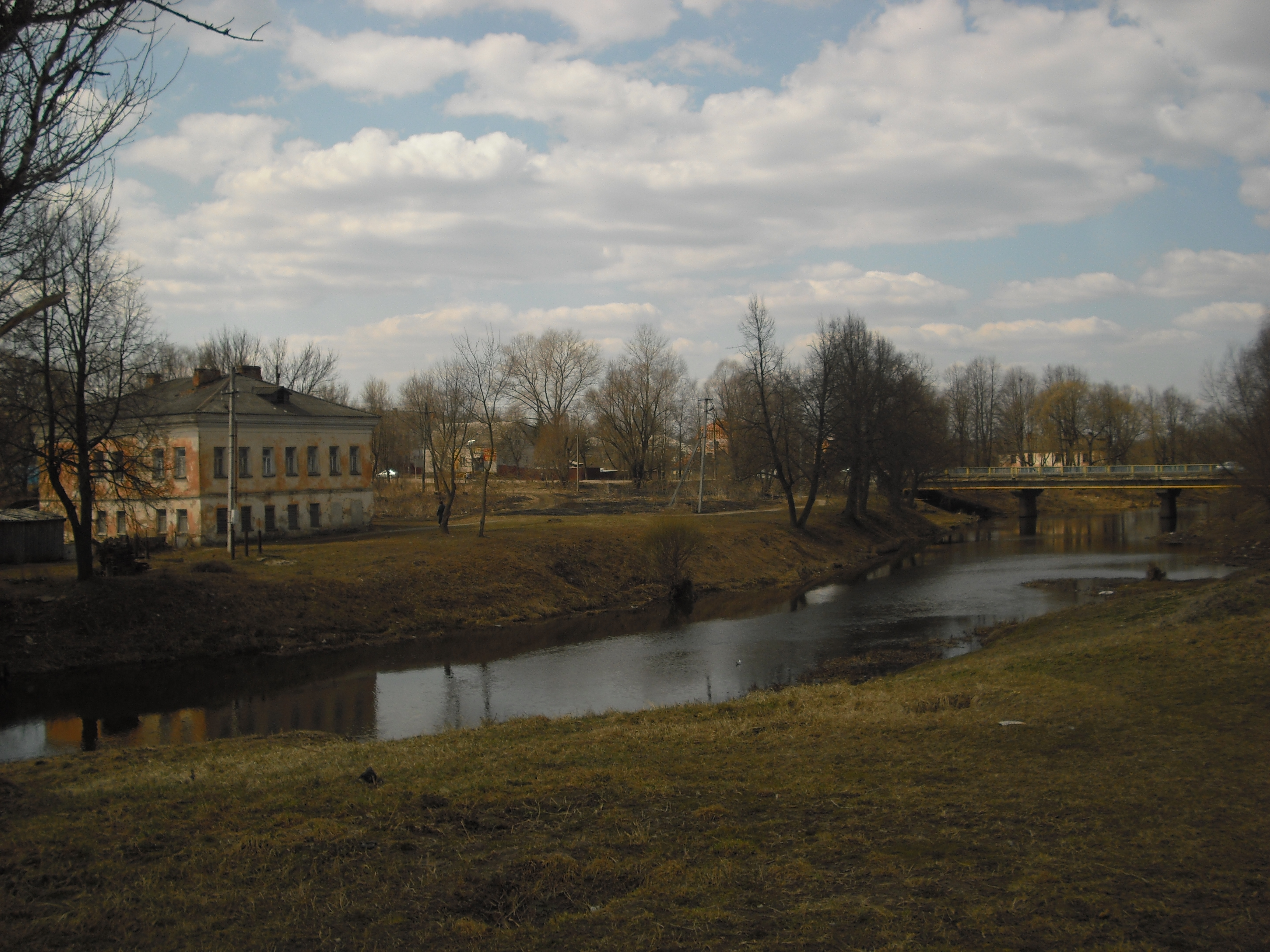 Мост через реку Вязьму в г. Вязьма